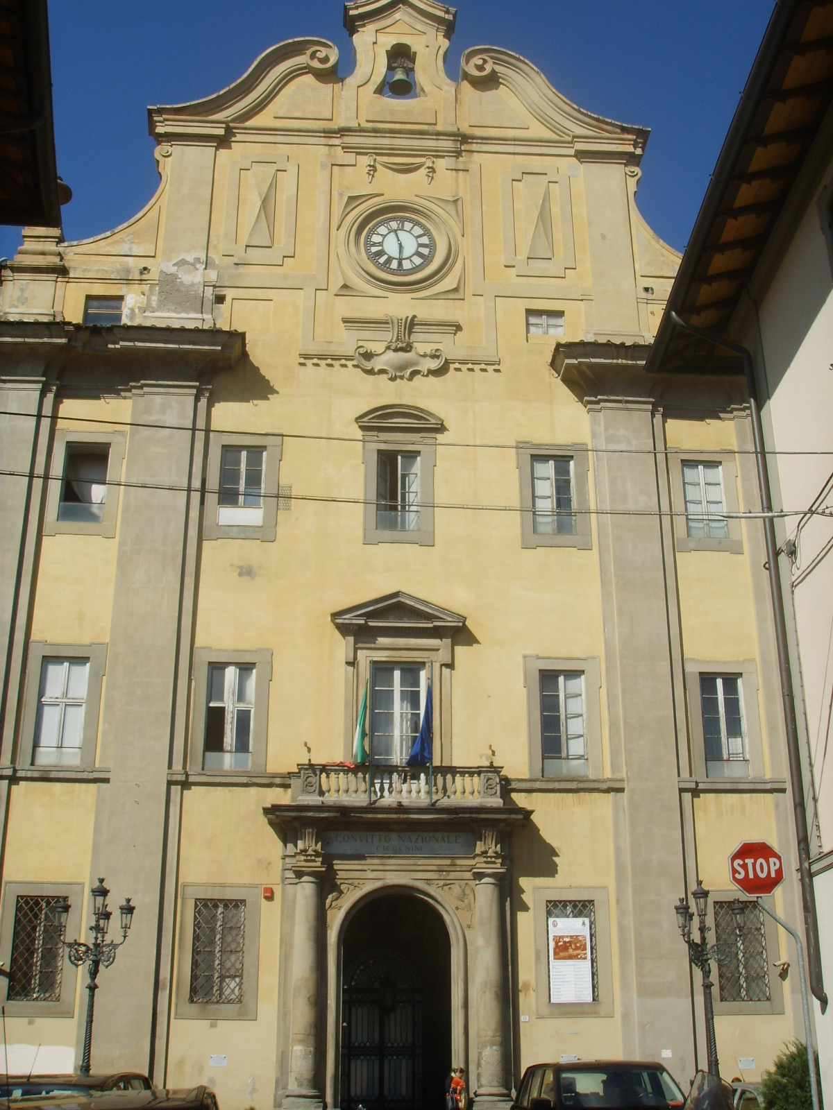 Collegio_cicognini